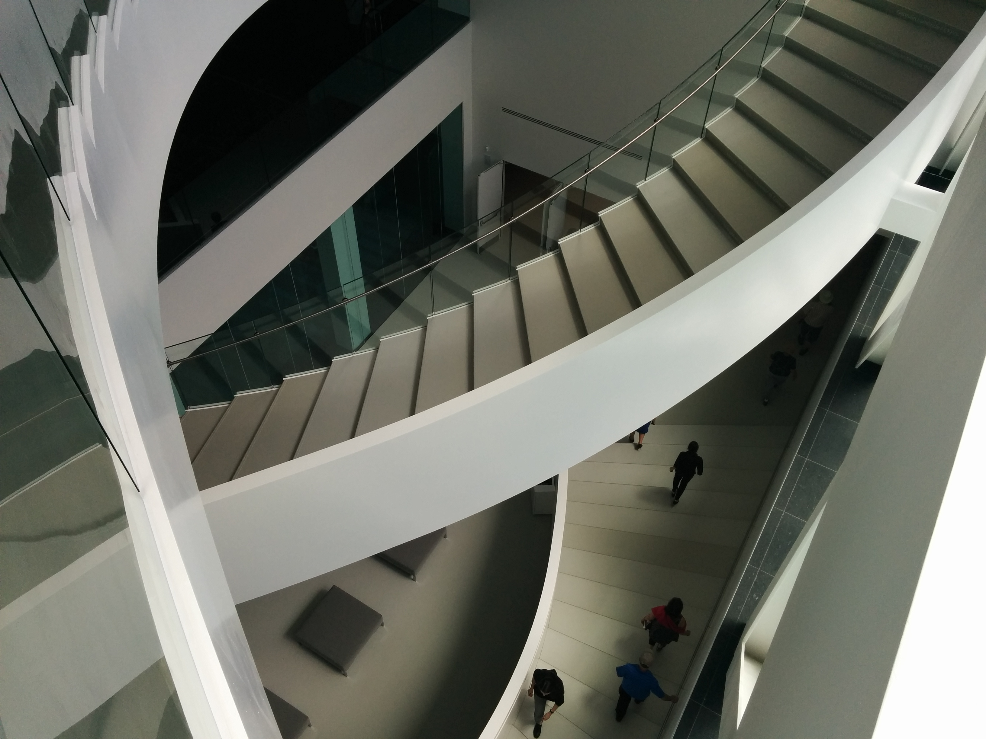 Pavillon Pierre-Lassonde, Québec